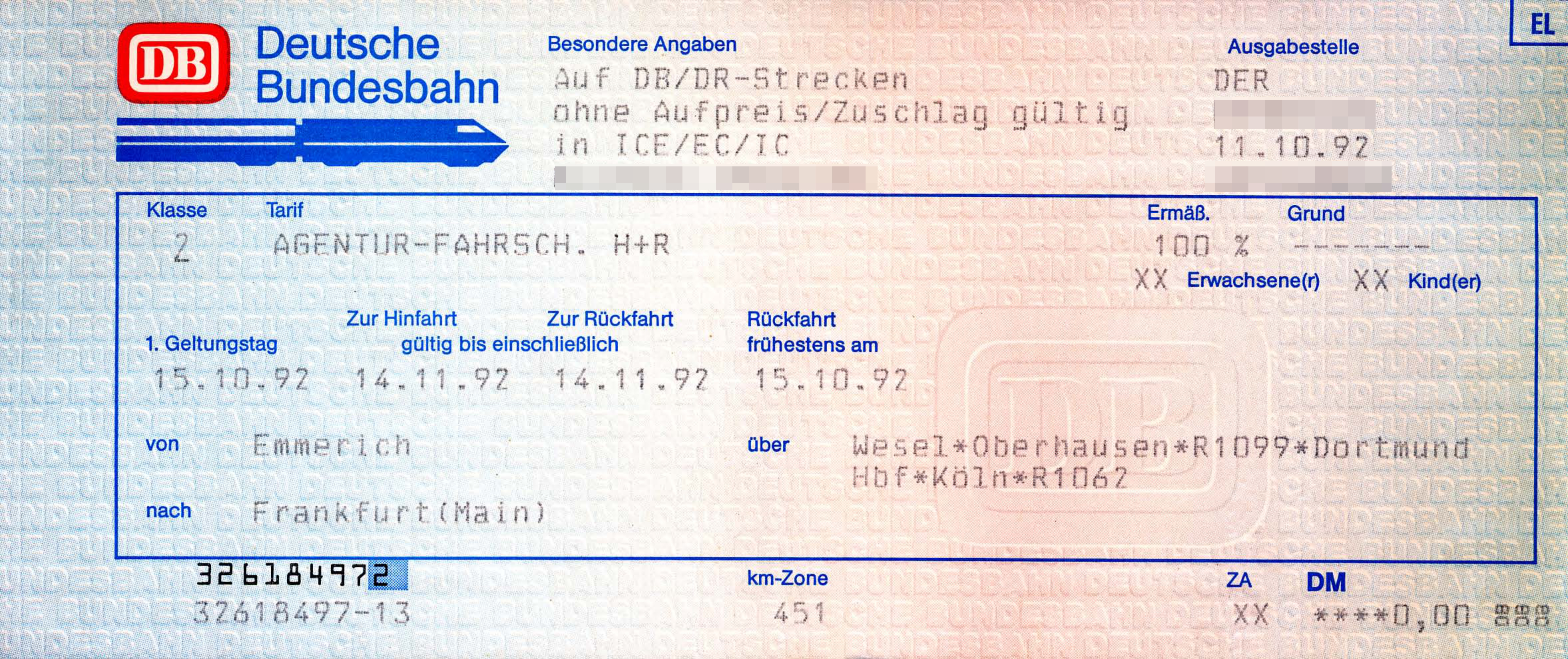 Agenturfahrschein/Freifahrschein Deutsche Bundesbahn - Emmerich-Frankfurt(Main)-Emmerich. Reisebüros mit DB-Lizenz erhielten eine bestimmte Anzahl Freifahrscheine pro Jahr